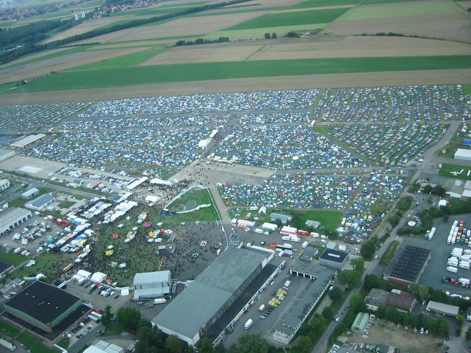 Luftaufnahme des Flugplatz Hildesheim (EDVM) - M'era Luna Festival 2005